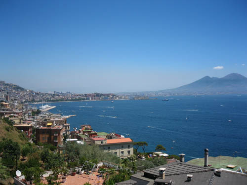 Неаполитанский залив и Везувий